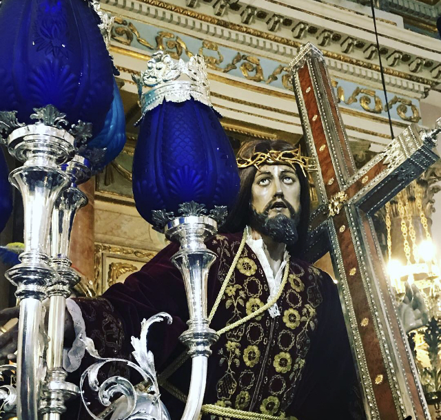 Paso titular de la Cofradía del Perdón de Orihuela.